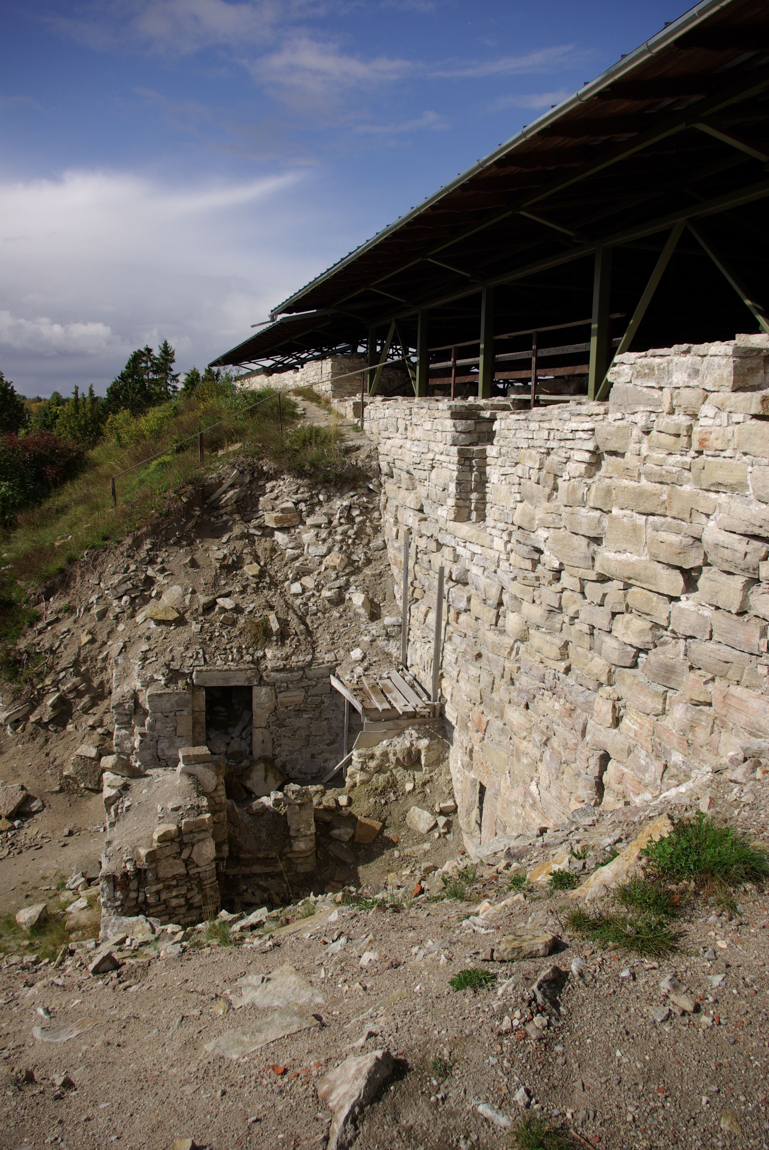 Maasi linnuse varemed Saaremaal. kunagi mulla ja kivirisude all peidnus olnut on hakatud tasapisi taastama ja külalistele avama.